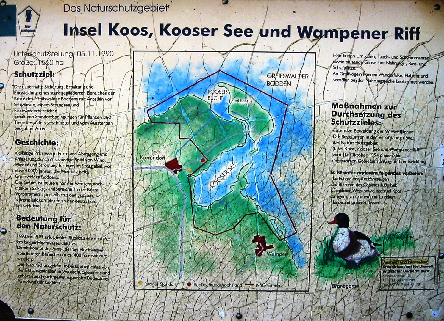 Hinweistafel auf das Naturschutzgebiet Insel Koos, Kooser See und Wampener Riff an der Abzweigung Dorfstraße zum Inselweg in Karrendorf, nördlich von Greifswald